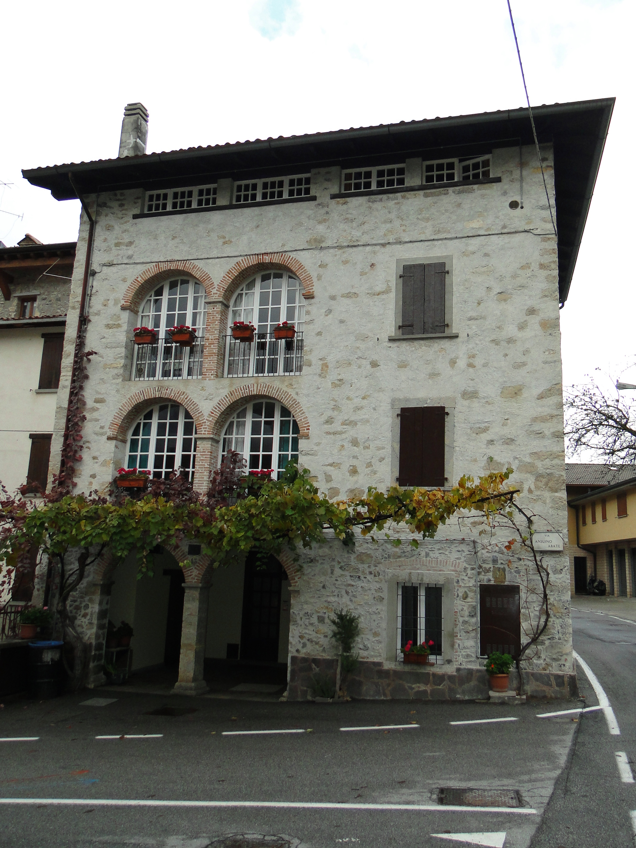 Casale, frazione di Albino (BG). Centro storico